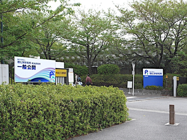 Main Gate, Riken Headquarters in Wako, Saitama, Japan